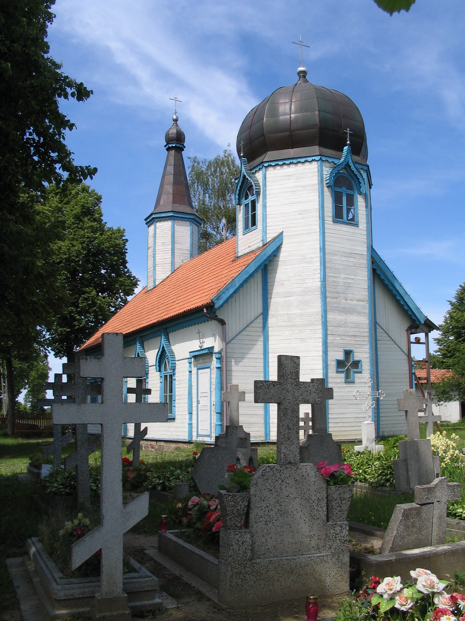 Wojnowo 24 - dawna molenna straroobrzędowców, obecnie cerkiew prawosławna pw. Zaśnięcia NMP, 1922-1927